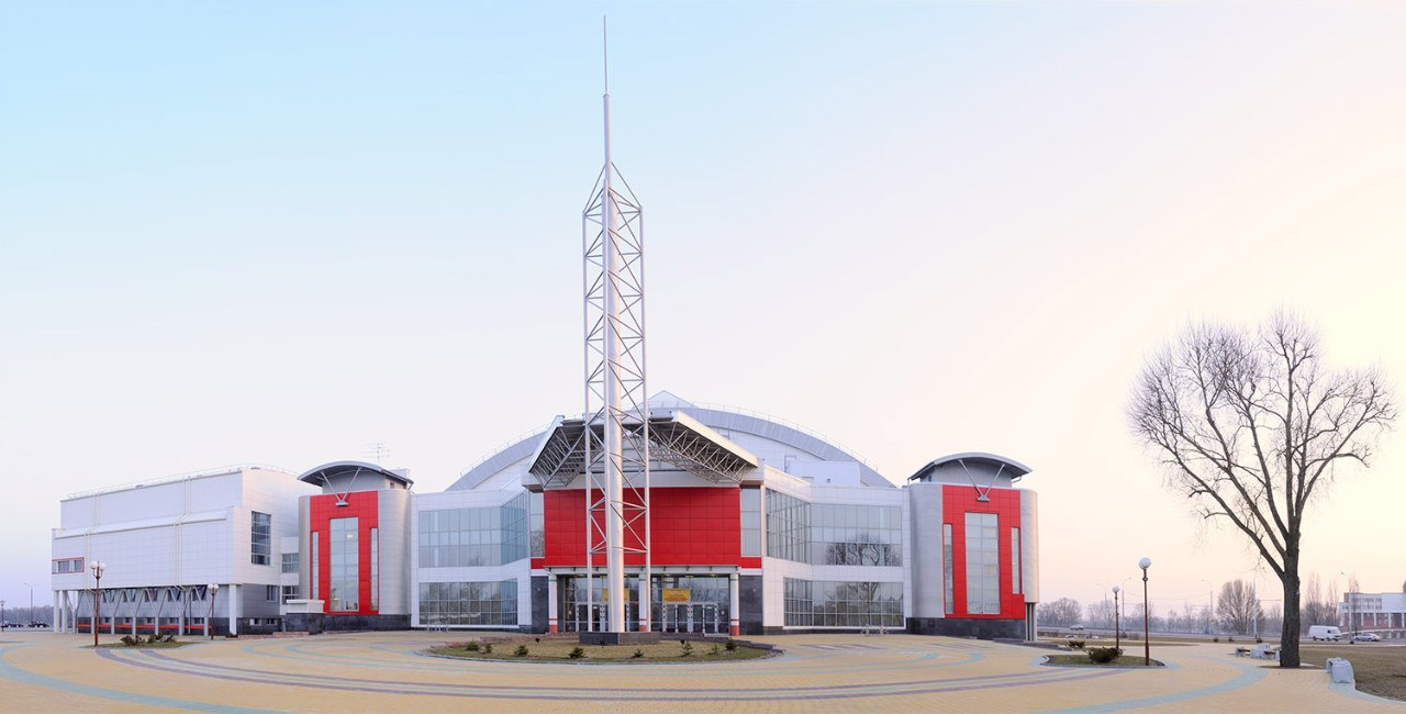 Дворец водных видов спорта